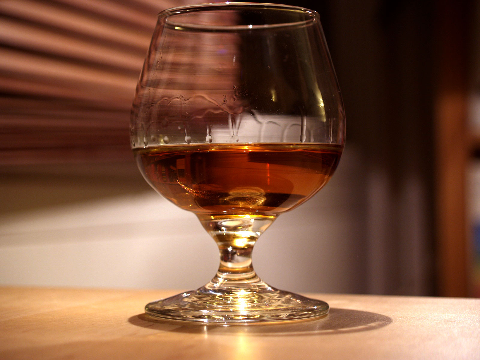 Cognac